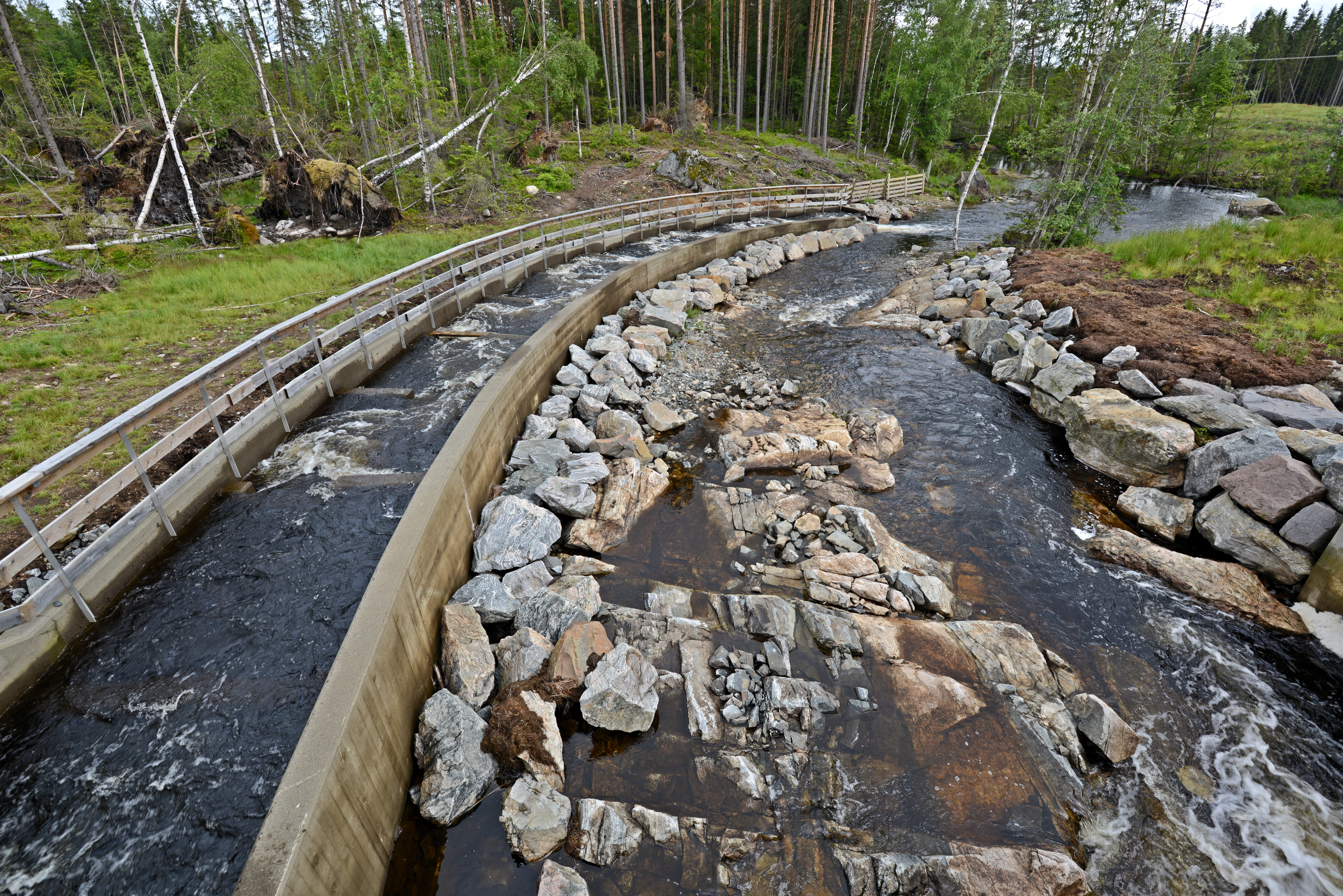 Gjermåa ved utløpet av buvatnet i Gjerdrum